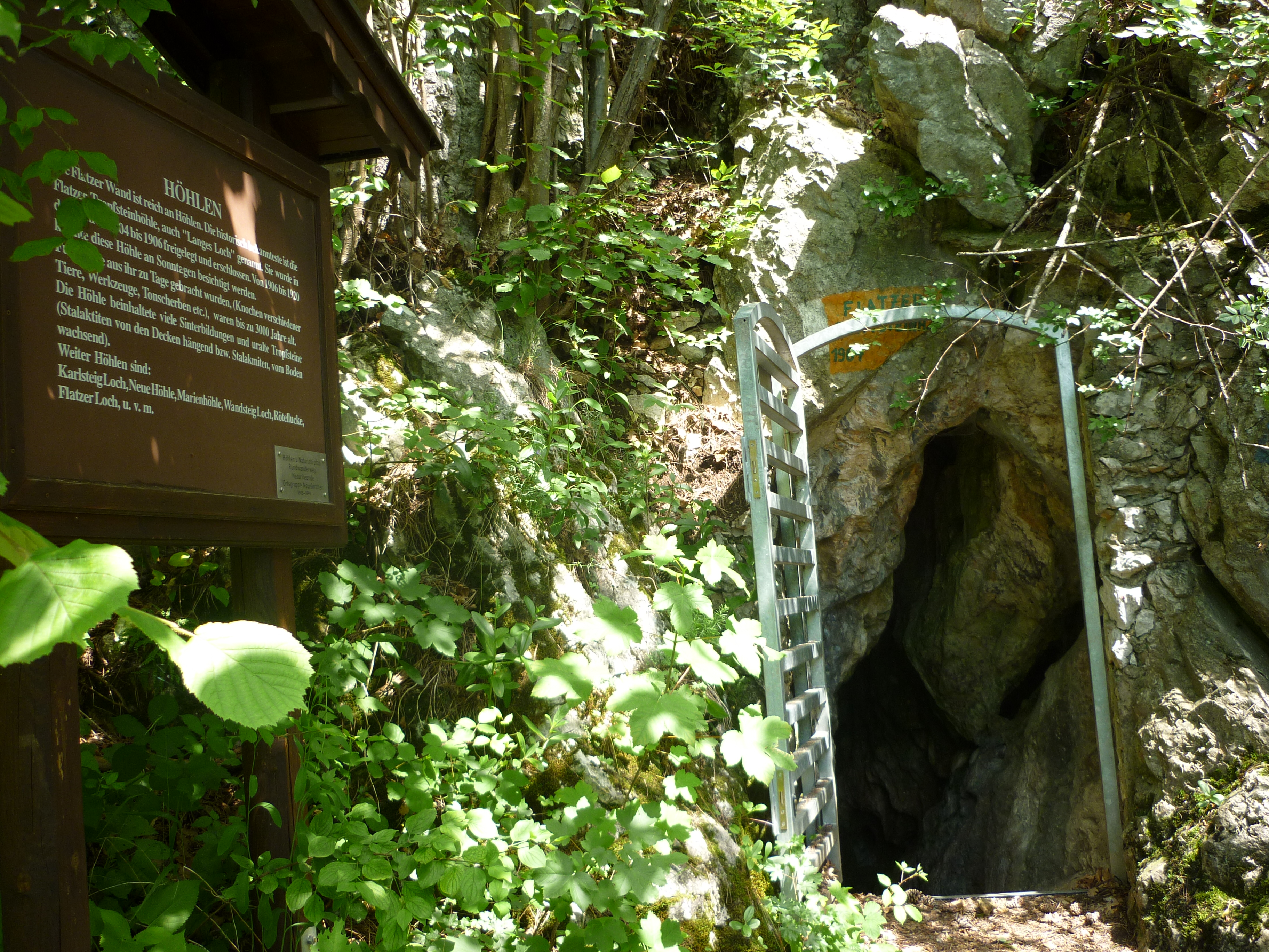 Eingang des Langen Loches, daneben eine Tafel. Flatzer Wand, Niederösterreich.